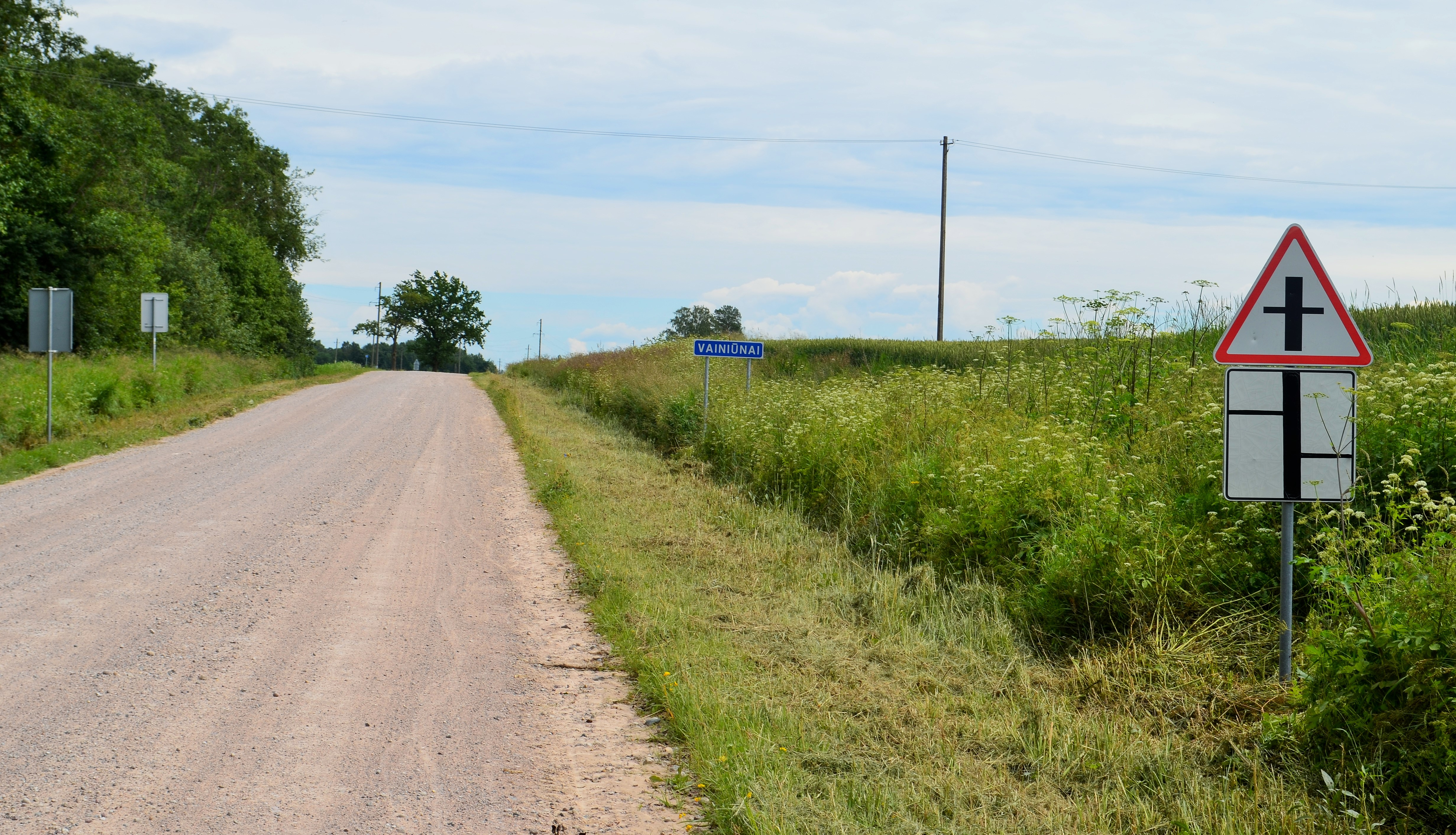 Kelias pro Vainiūnus, Kėdainių raj.